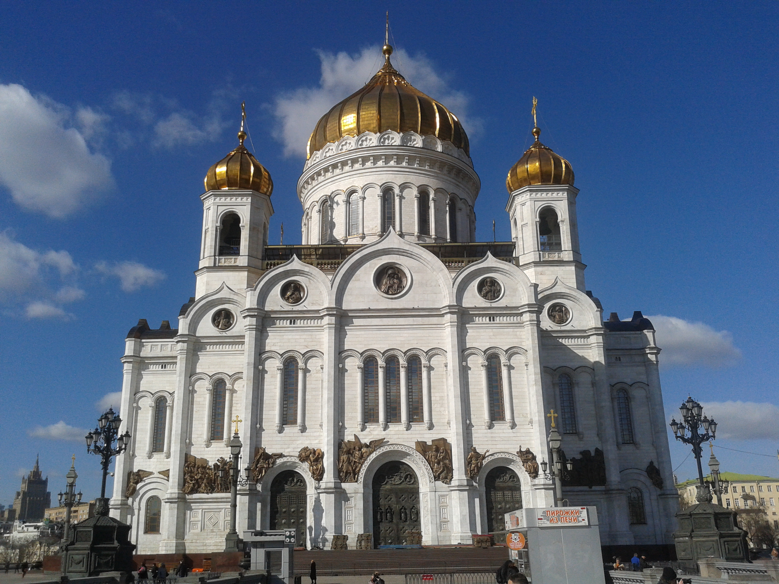 Храм Христа Спасителя, Москва. Вид с моста патриарха Алексия II